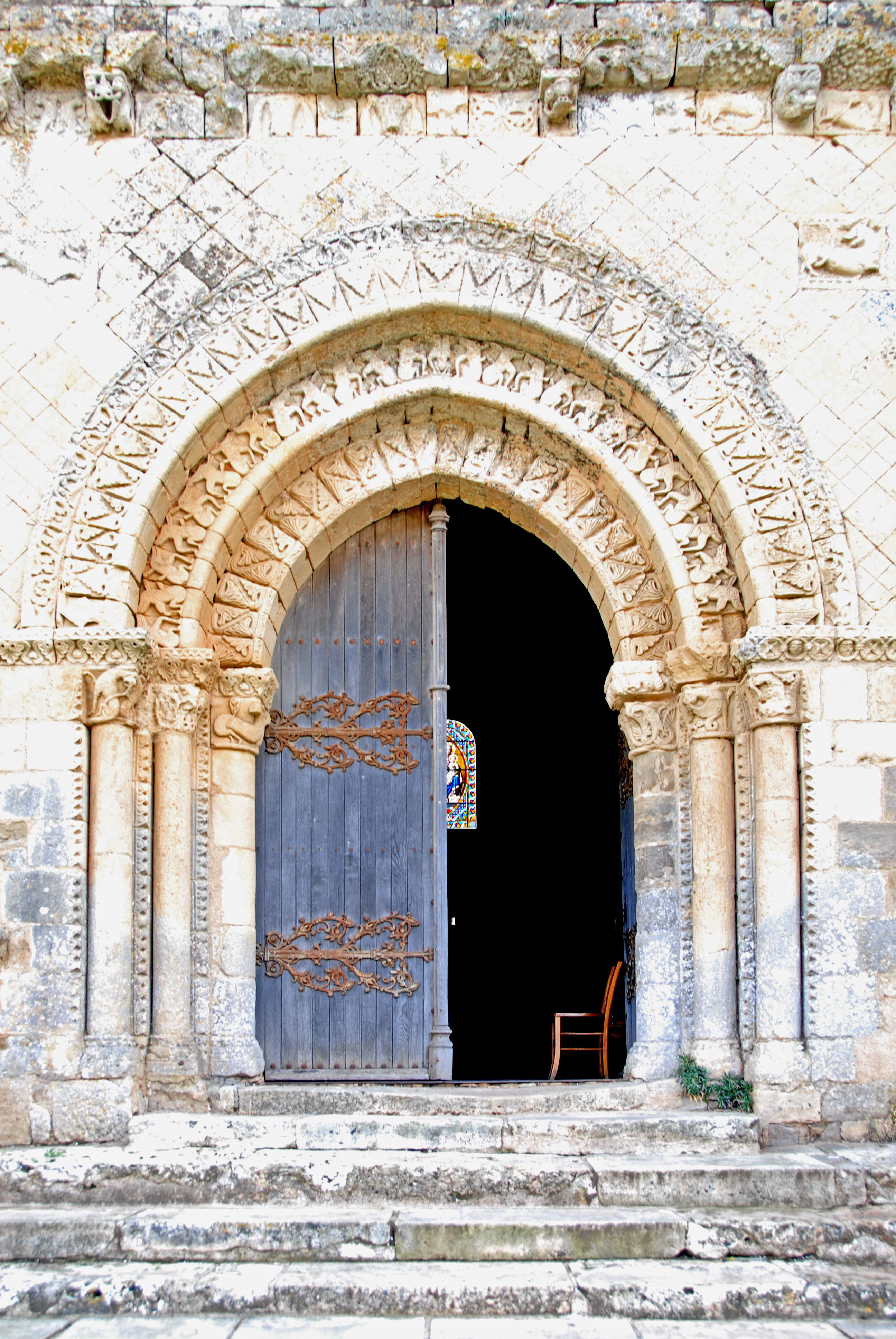 Château-Larcher, Kirche, Hauptportal